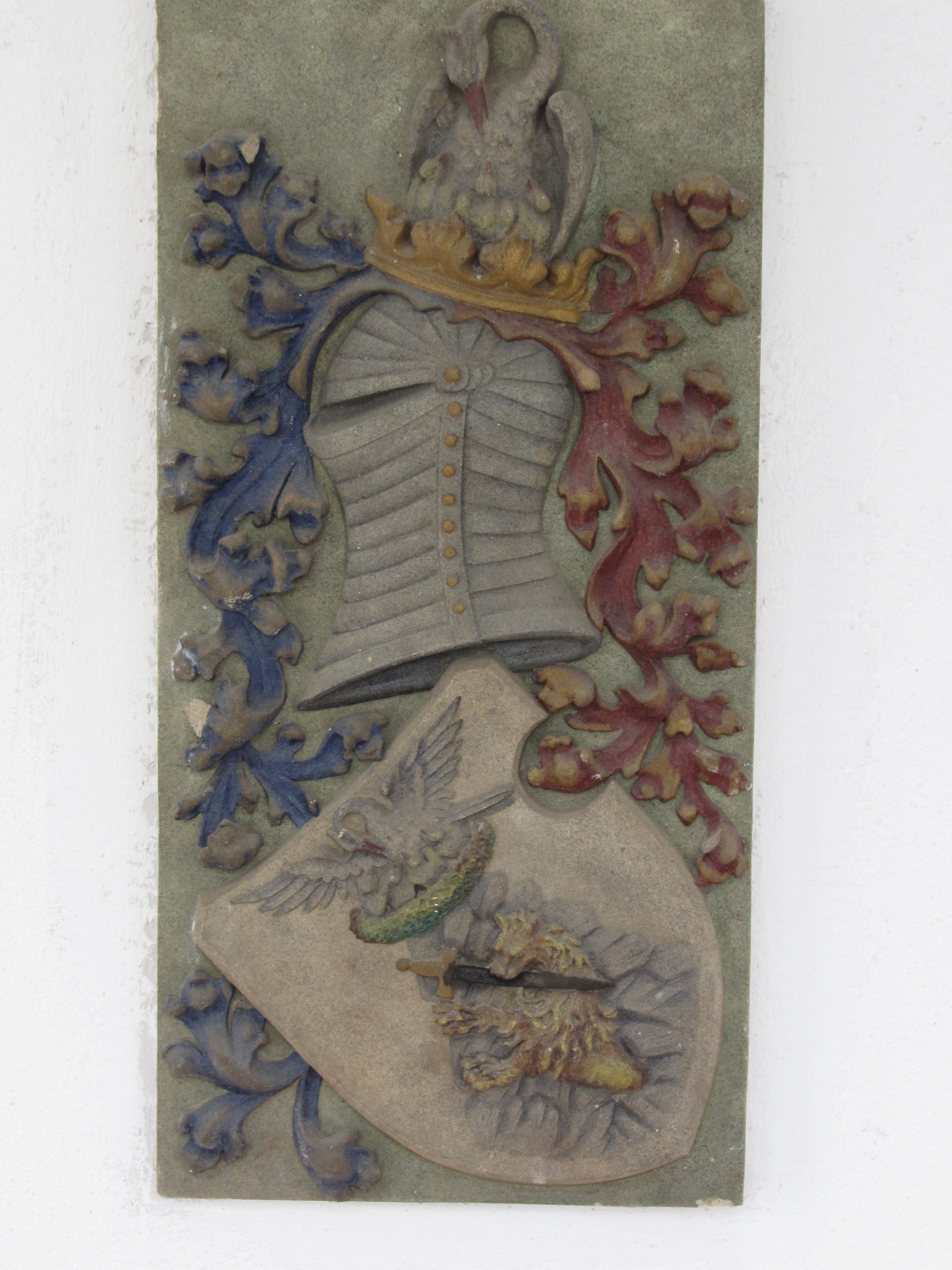 Schloss Tabor - Wappenkartusche am Rundturm